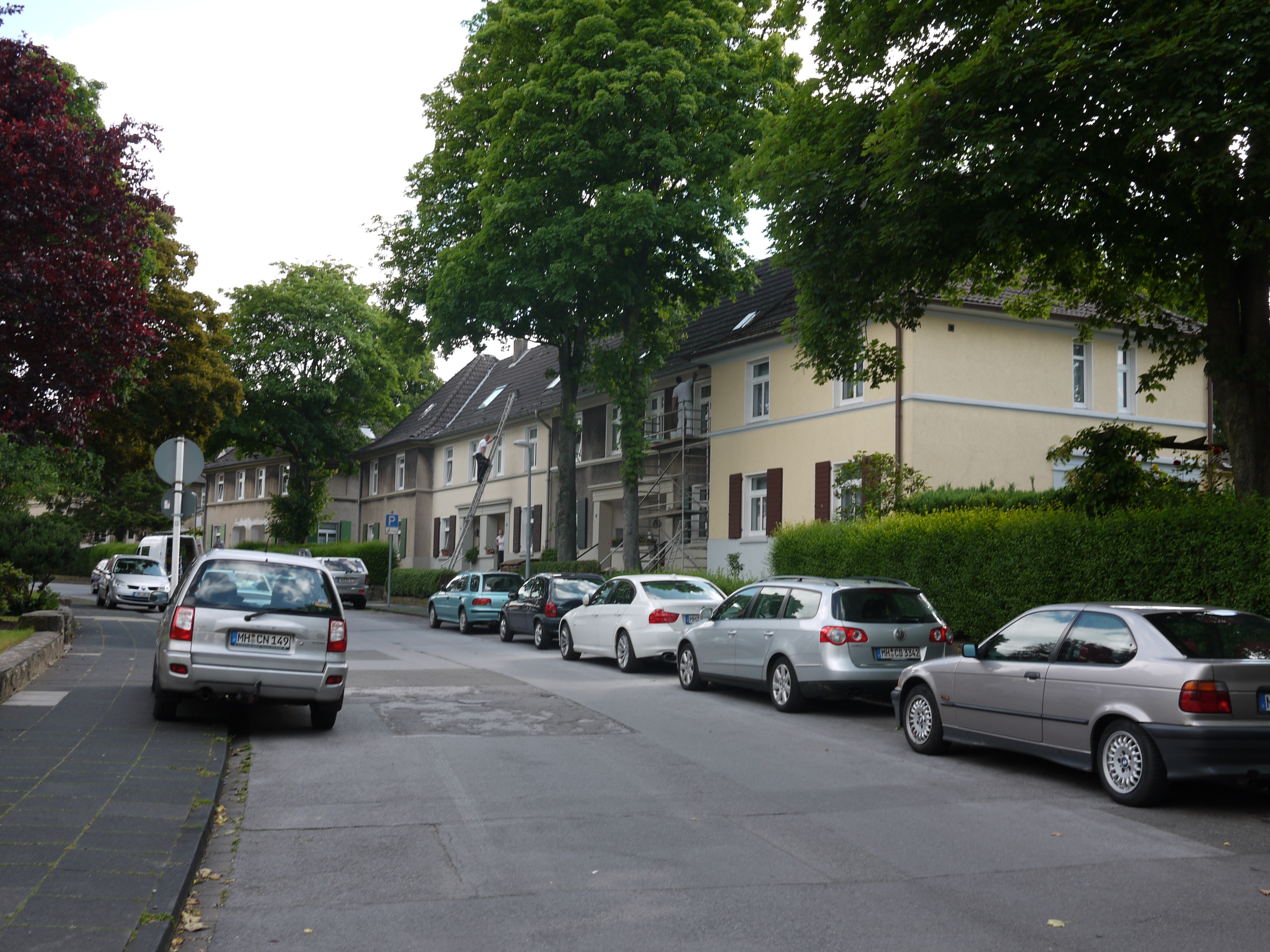 Papenbuschstraße, Mülheim an der Ruhr